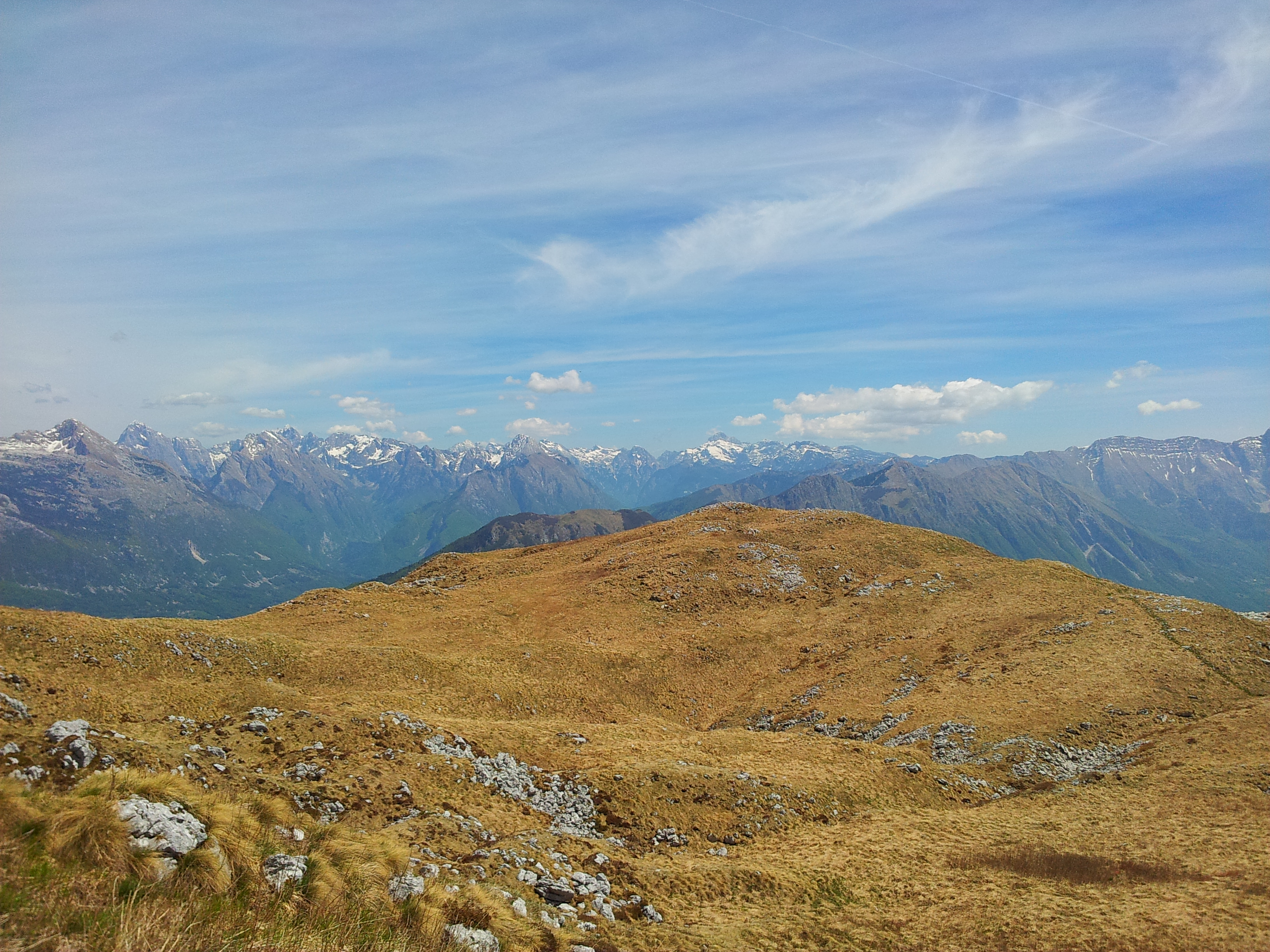 Pogled na Julijske Alpe z vrha Stola.